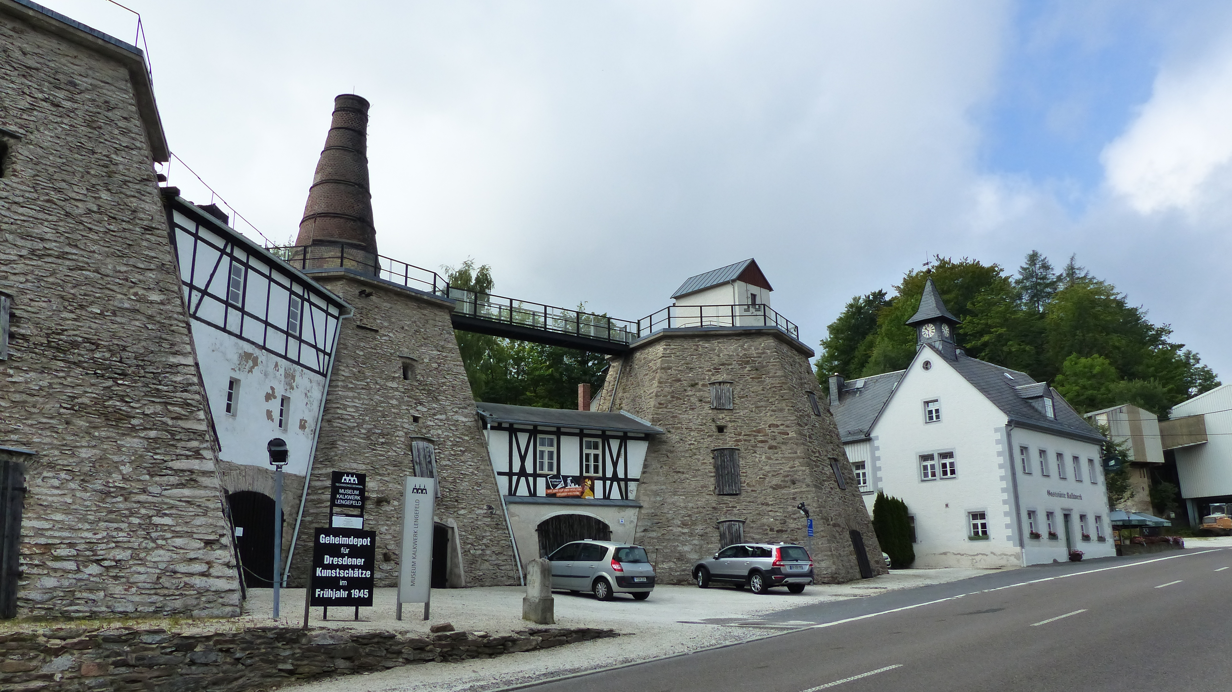 Kalkwerk Lengefeld, Sachsen